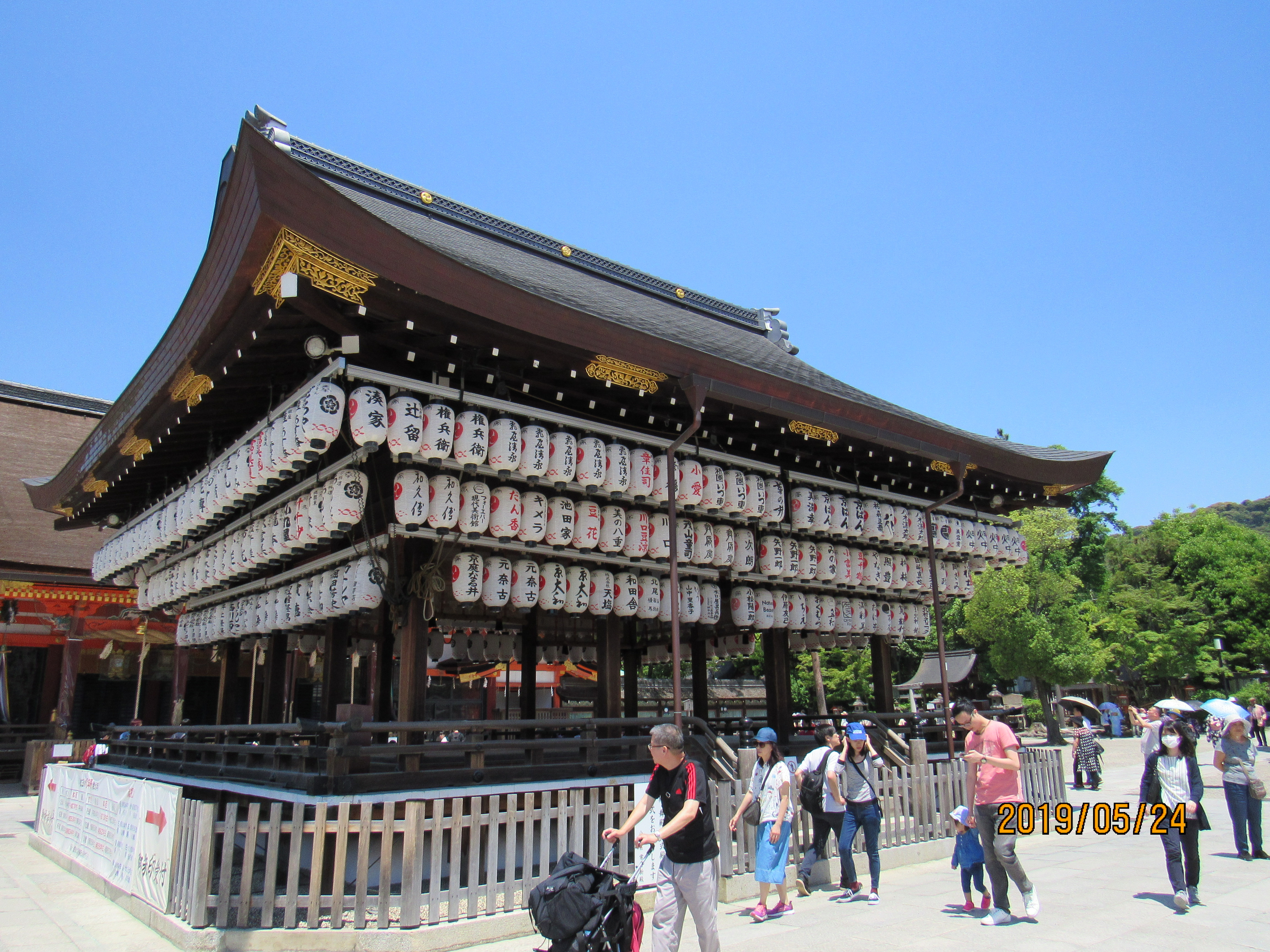 JAPAN Kyoto Yasaka 京都 八坂神社